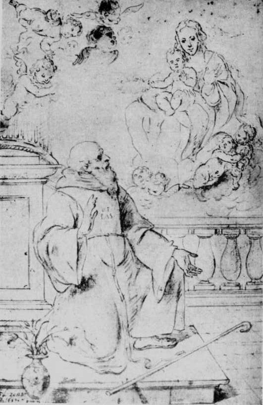 Aparición de la Virgen a San Francisco de Paula, Florencia, Museo de los Uffizi